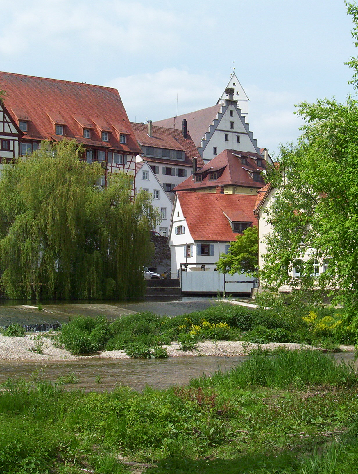 Fotograf: Bernd Reichelt, aufgenommen im Mai 2004